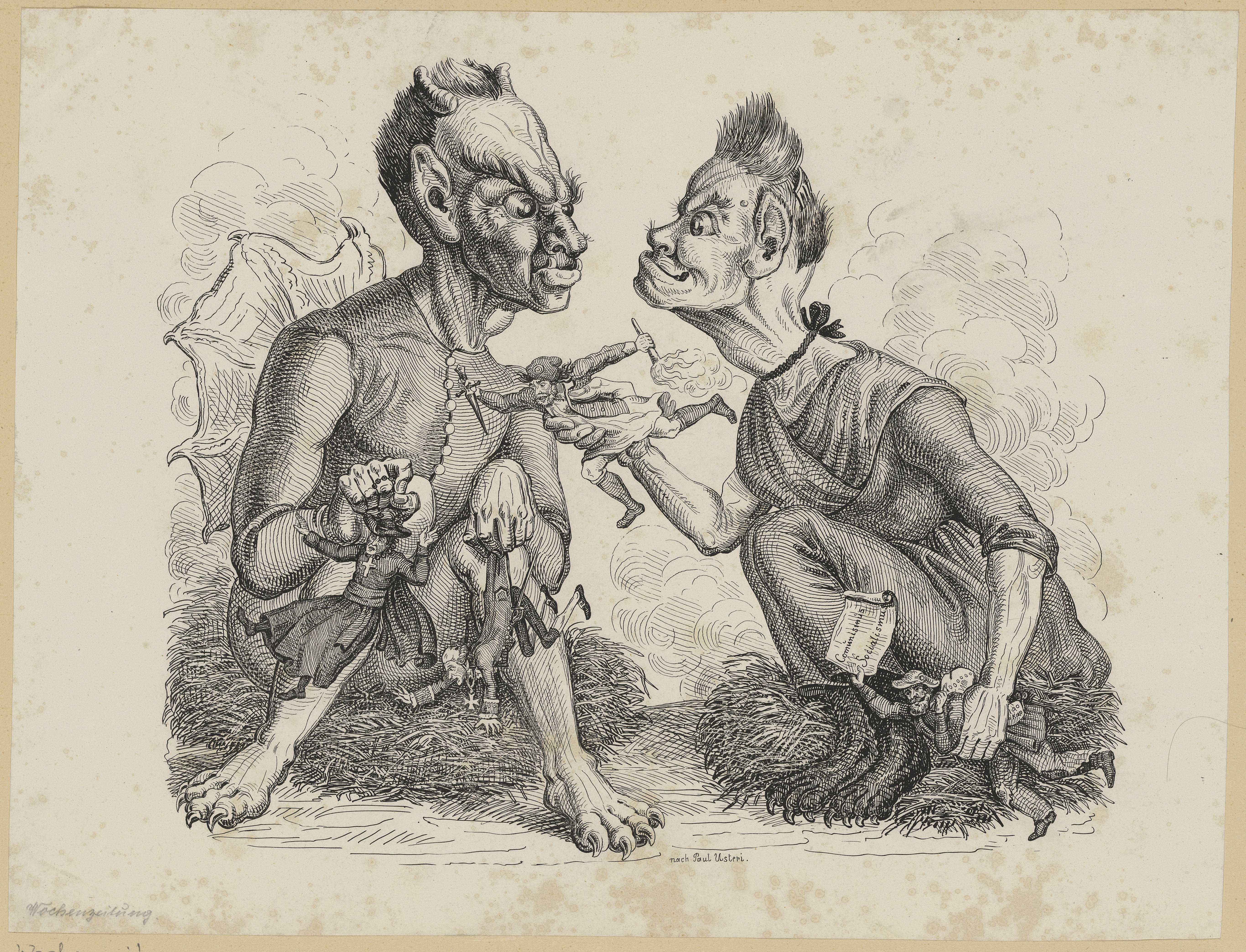 Aus der "Wochenzeitung", 14. Januar 1845, Der Teufel wetteifert mit seiner Grossmutter und verliert. Sie zeigen sich ihr "Puppen": einen Jesuiten, einen Diplomat, einen Jakobiner und einen Kommunisten